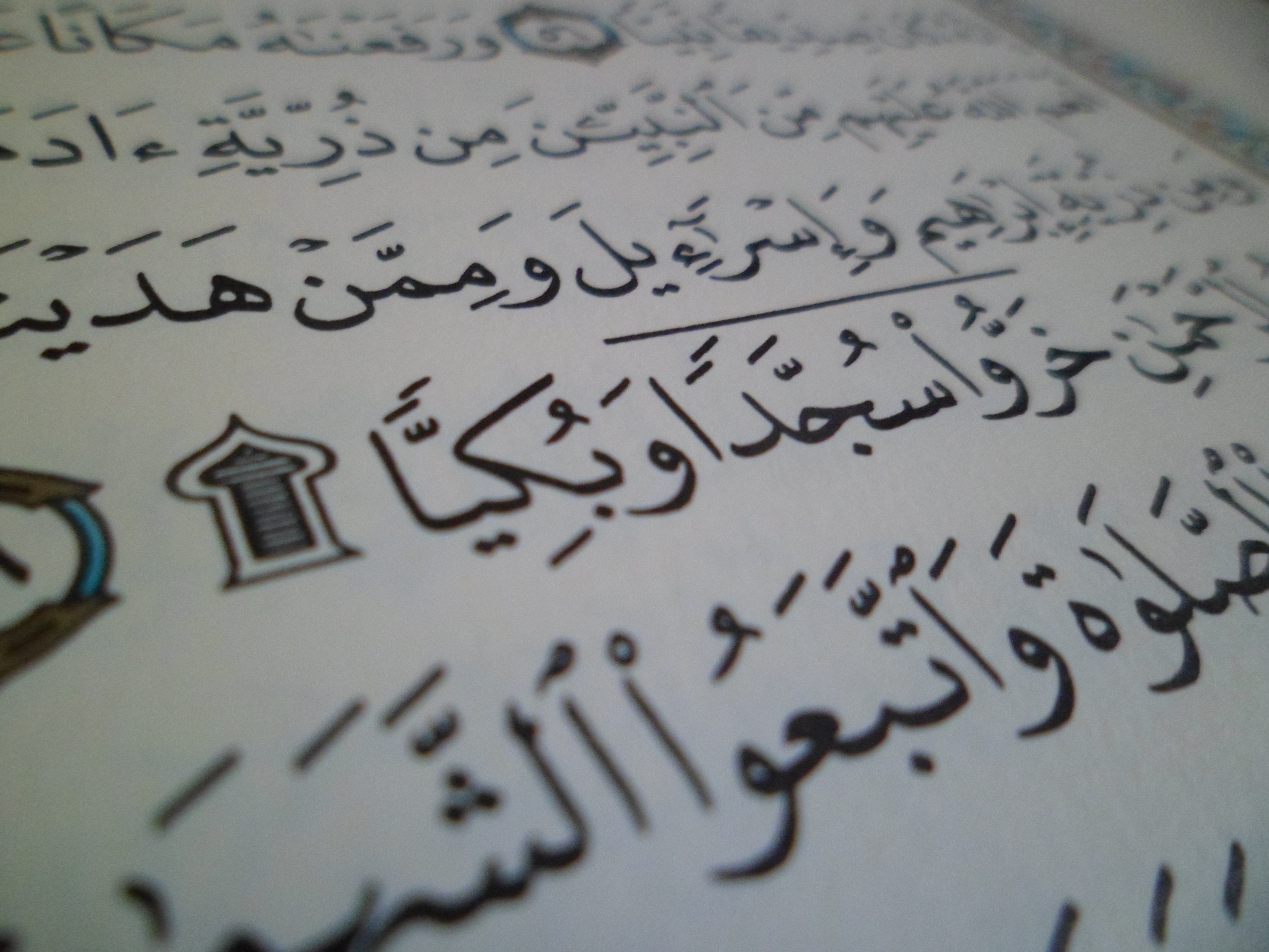 سجدة بسورة مريم